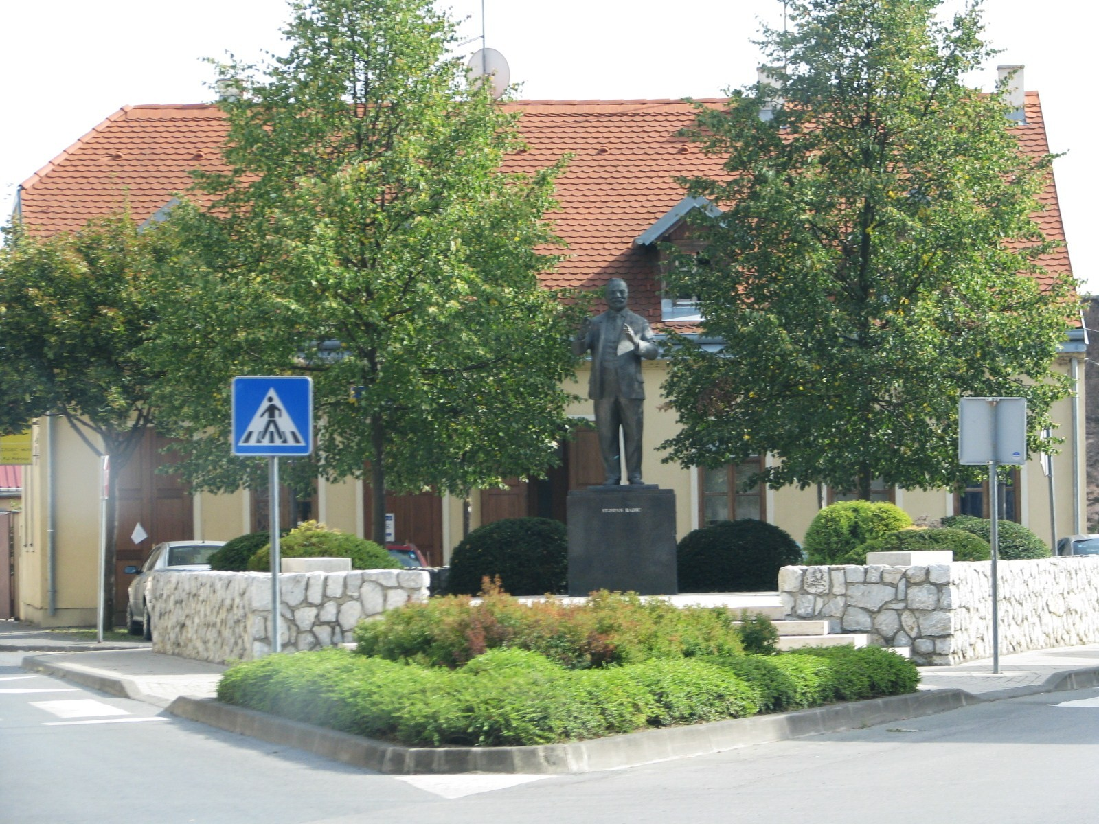 Spomenik Stjepanu Radiću u Petrinji